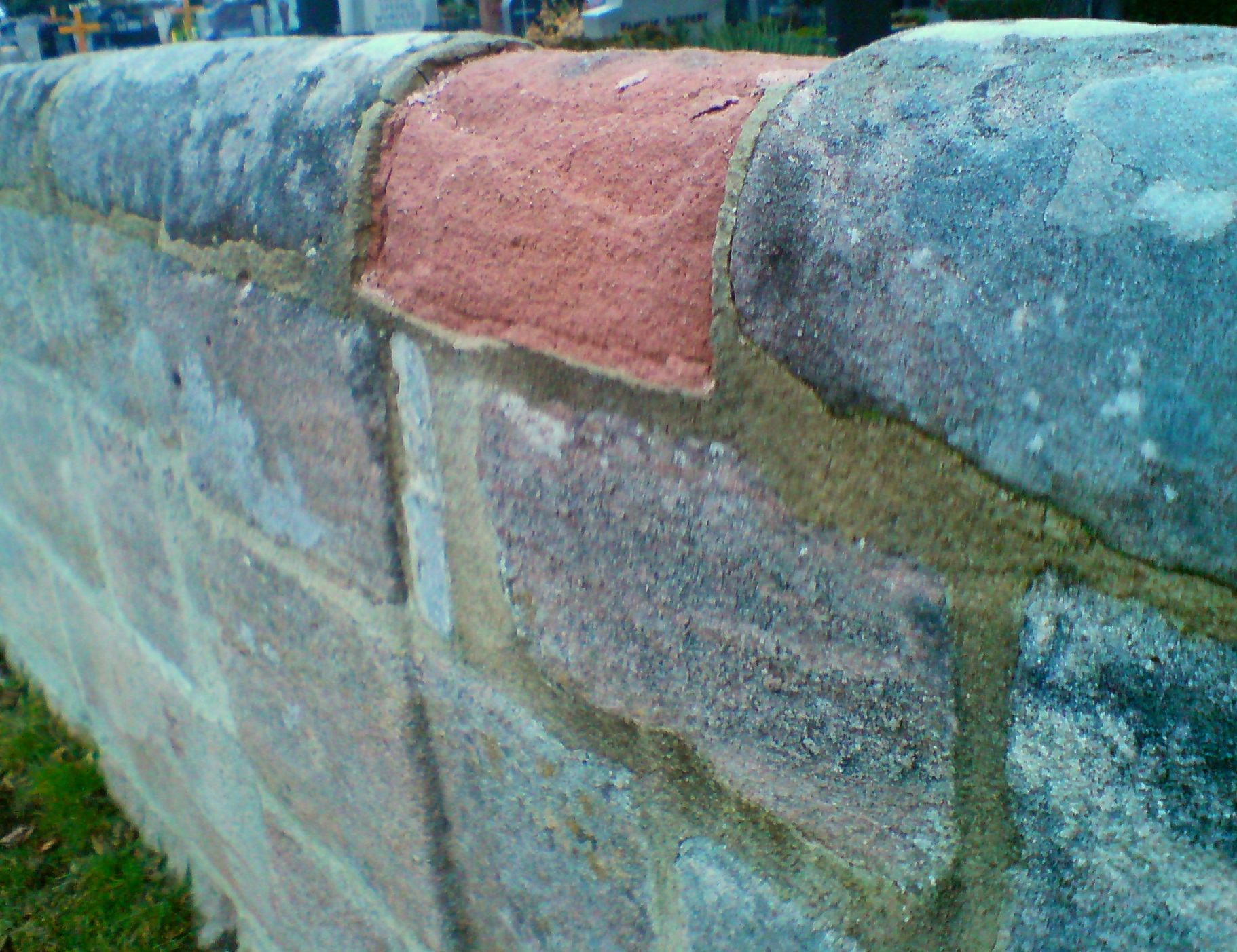 Friedhofsmauer_2